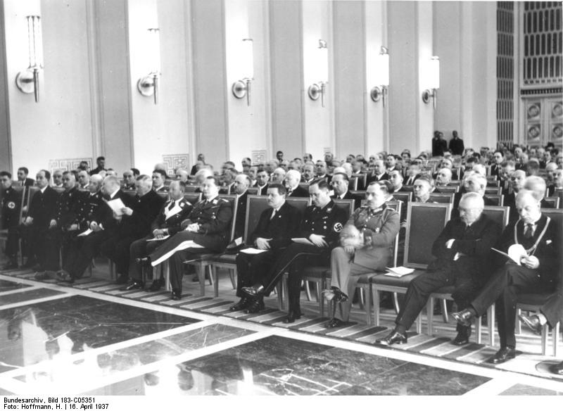 Scherl: Eröffnungssitzung der Deutschen Akademie der Luftfahrtforschung durch den Präsidenten, Generaloberst Göring. (Ehrensaal des RLM) Während des einleitenden Musikstückes. in der Mitte Generaloberst Göring, weiter rechts die Reichsminister Dr. Ohnesorge und Darré, links von Göring General der Flieger, Staatssekretär der Luftfahrt Milch, die Reichsminister Gürtner und Dorpmüller und Staatssekretär Lammers.